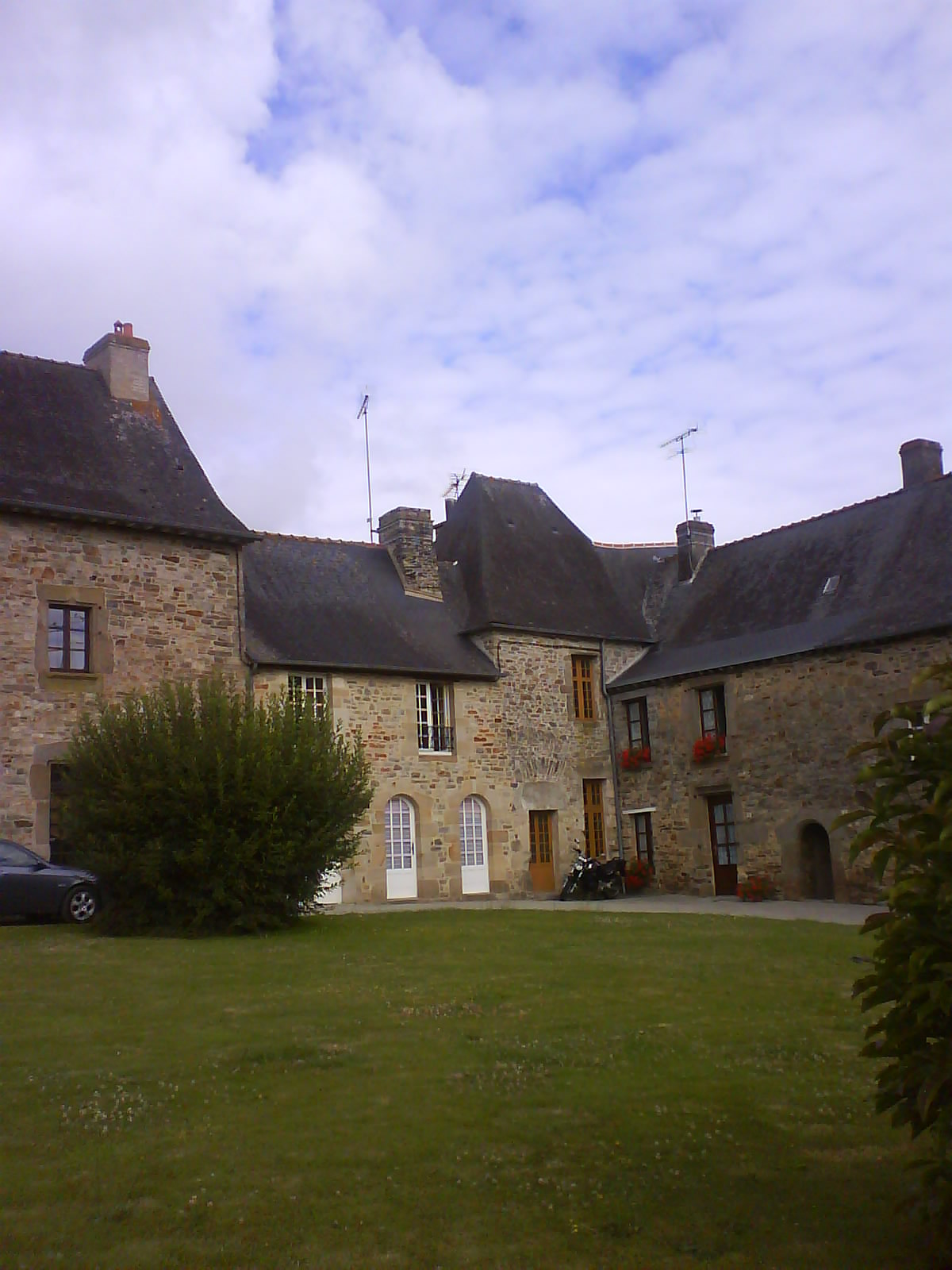 Cloitre de Champeaux (Ille-et-Vilaine).